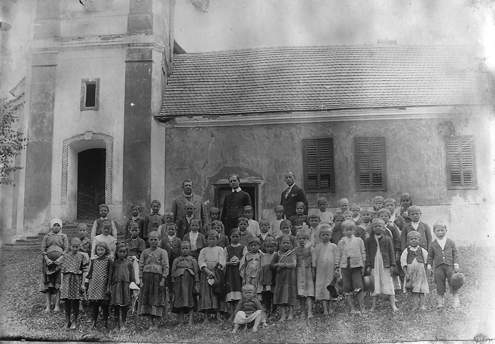 Монастир в Імстичеві - 1920-і рр.